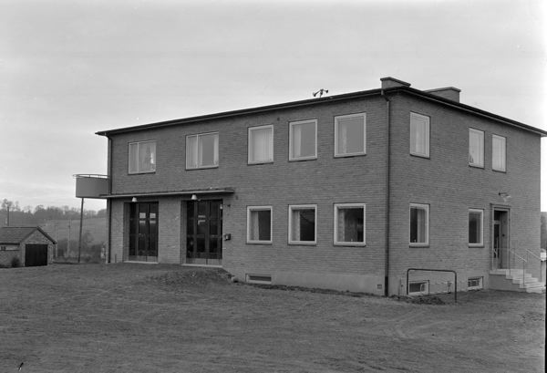 Den nybyggda brandstationen i Vallåkra 1954.